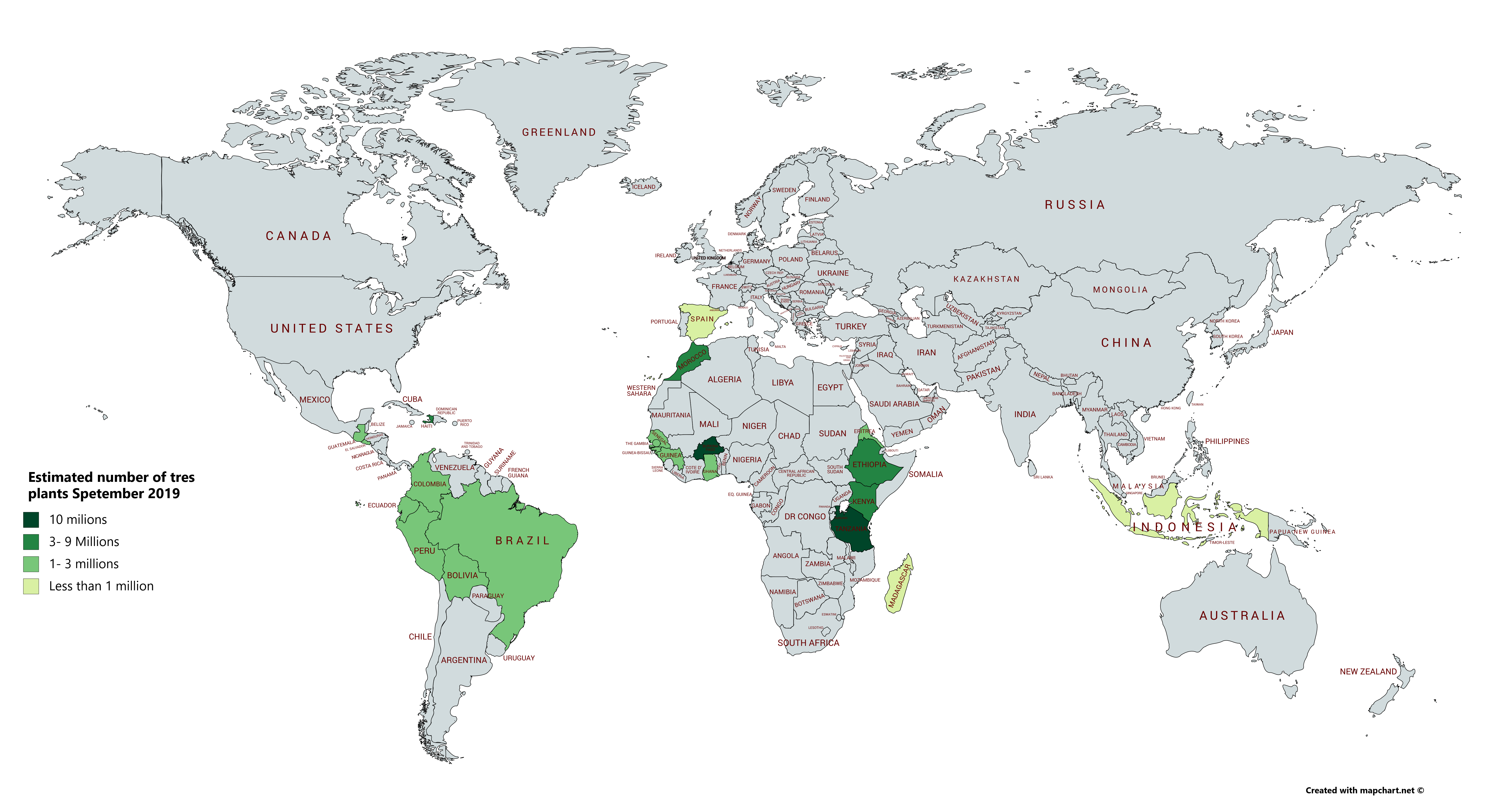 Estimated number of tres plants Spetember 2019